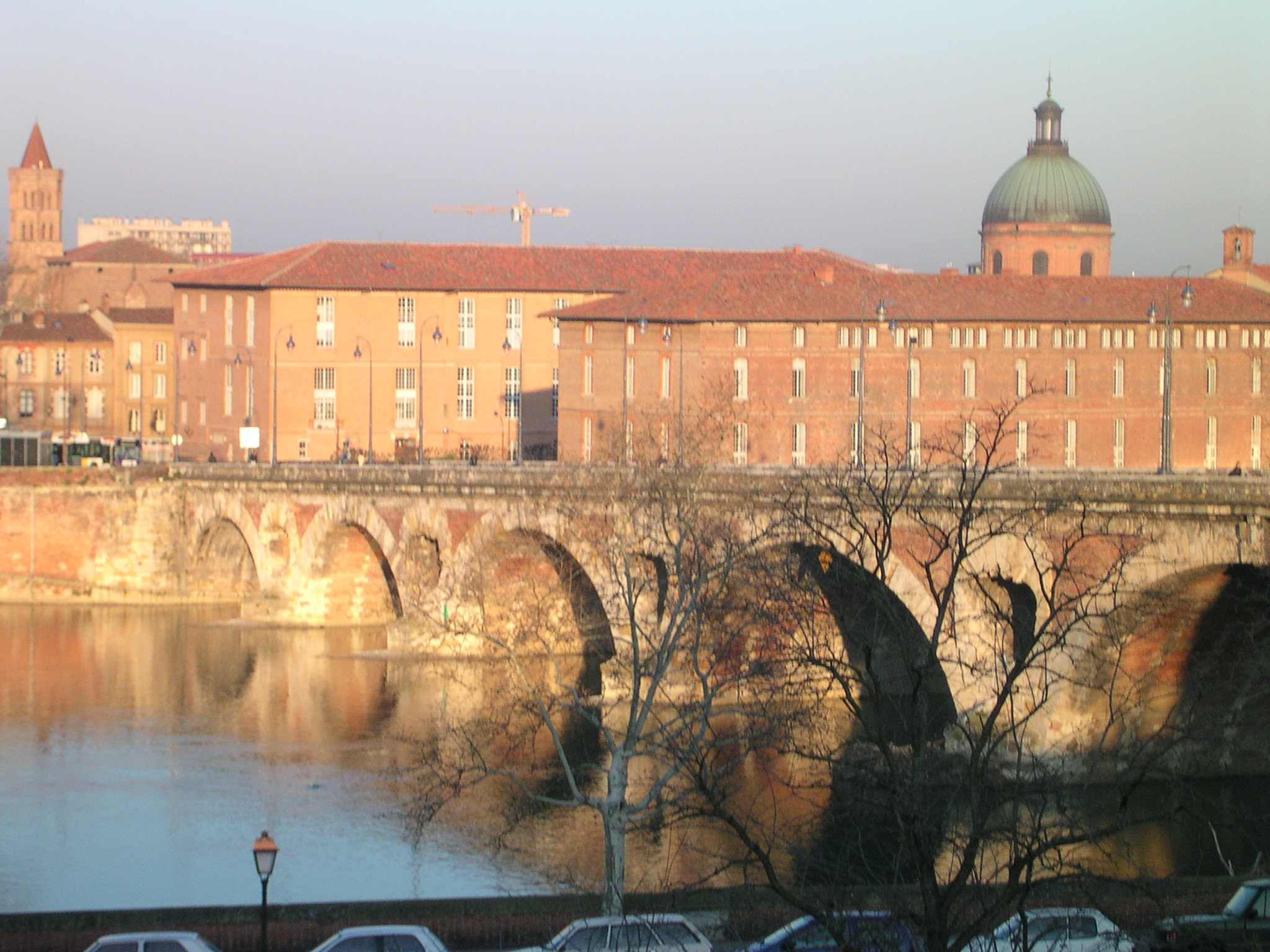 La Garonne à Toulouse vue du quai de Tounis.